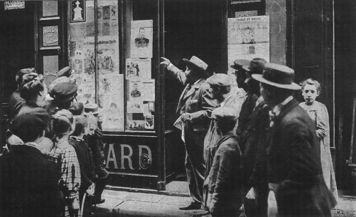 "M. Napoléon Hayard faisant le boniment aux camelots, rue Saint-Joseph".